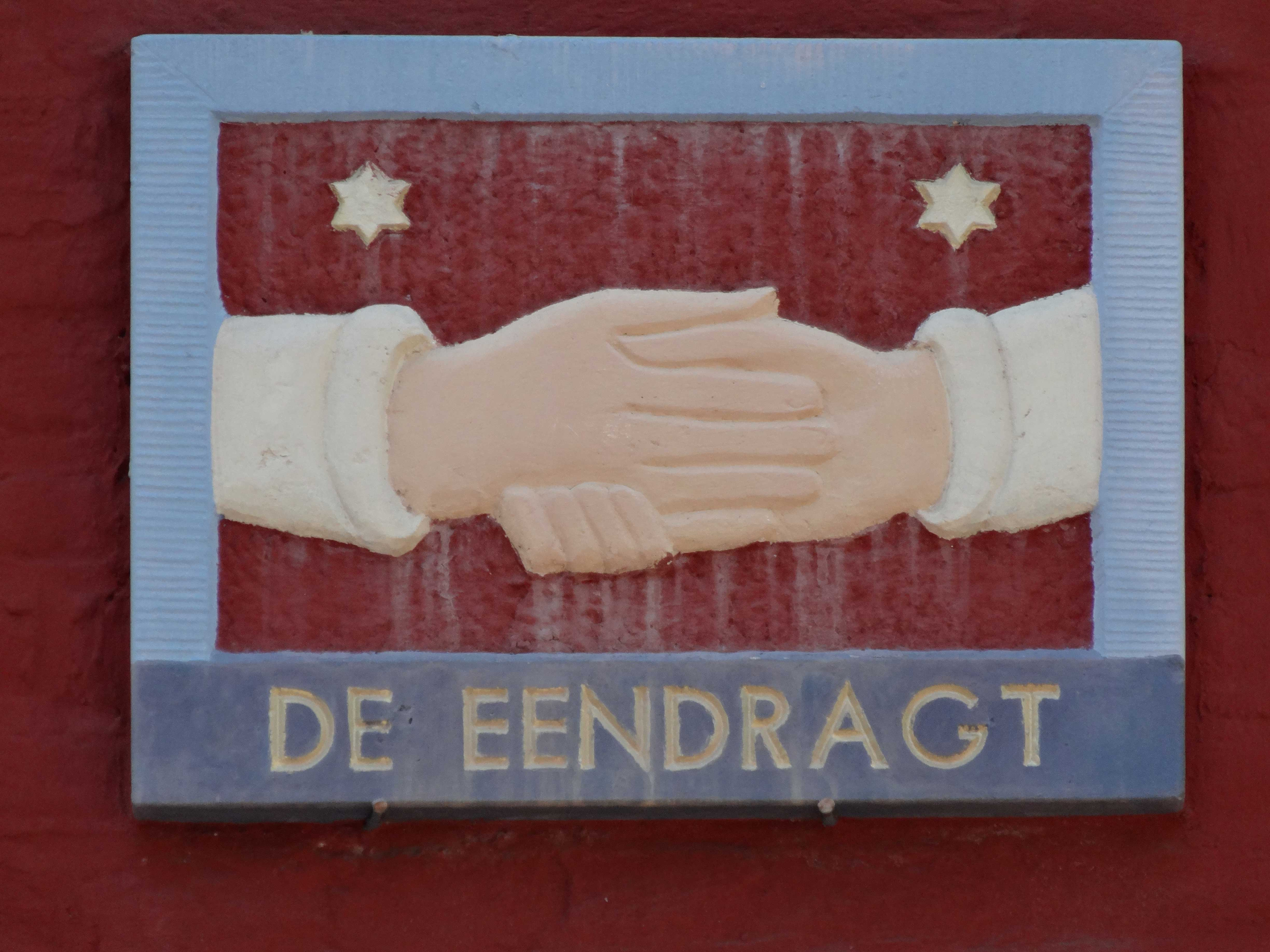 ""De Eendragt"" een rijksmonumentaal pand aan de Nieuwehaven 334 te Gouda. De gevelsteen is een ontwerp an oud directeur van museum Gouda dr. Jan Schouten, de steenhouwer A. Roodbol vervaardigde de steen en P.J. Revet sr. zorgde voor de polychromering. Bron: Goudse gevelstenen (2004) van Theo de Jong, pagina 123